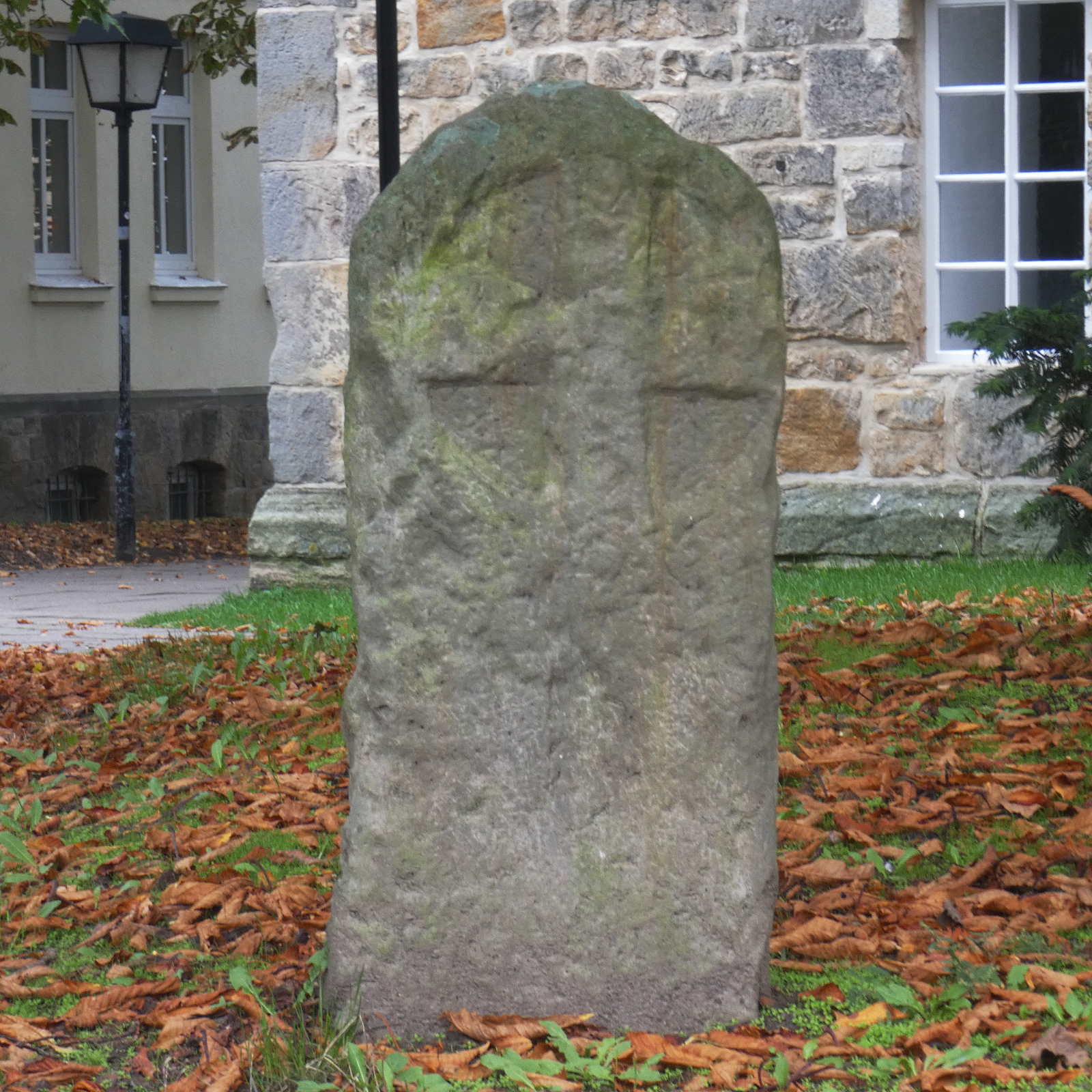 Die Kreuzsteine, oder früher die 5 Steine, sind eine Gruppe von Kreuzsteinen in Hiddestorf, einem Stadtteil von Hemmingen in der Region Hannover in Niedersachsen